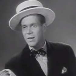 「飾窓の女」におけるダン・デュリエ